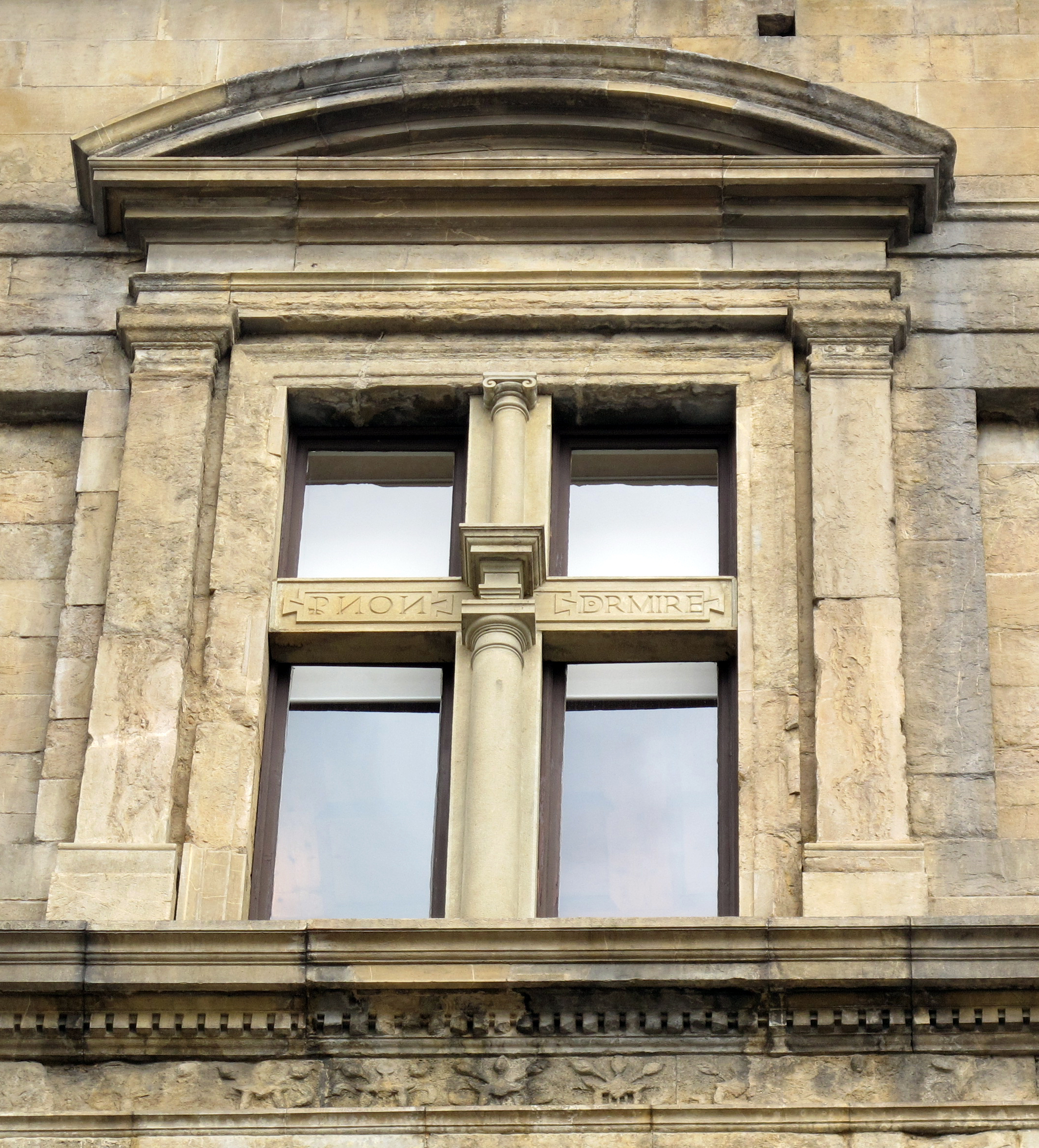 Firenze